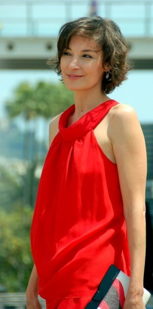 Jeanne Balibar au Festival de Cannes.